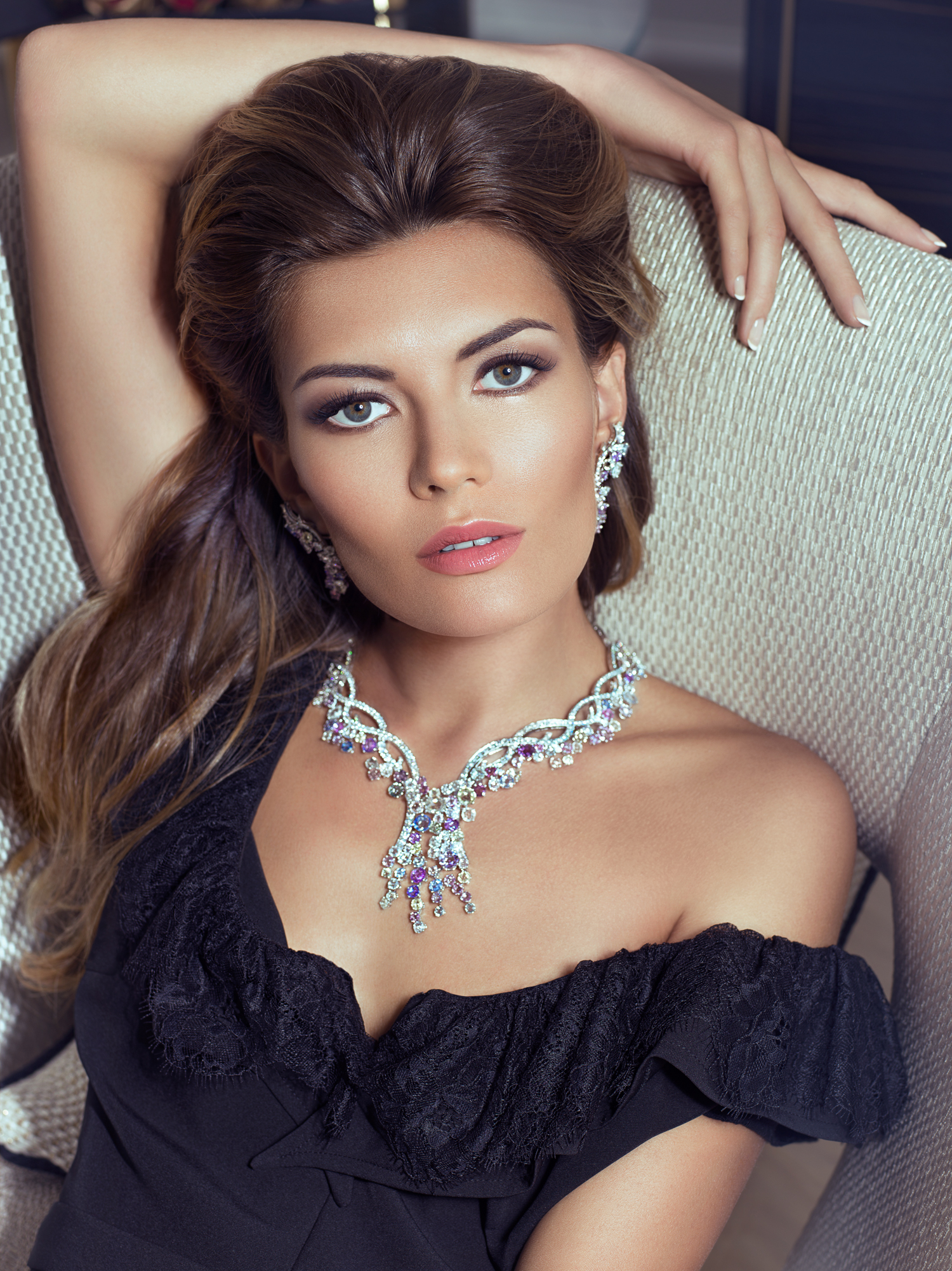 Van Cleef & Arpels Collection Jardin Parfumé photographié par Gil Zetbase